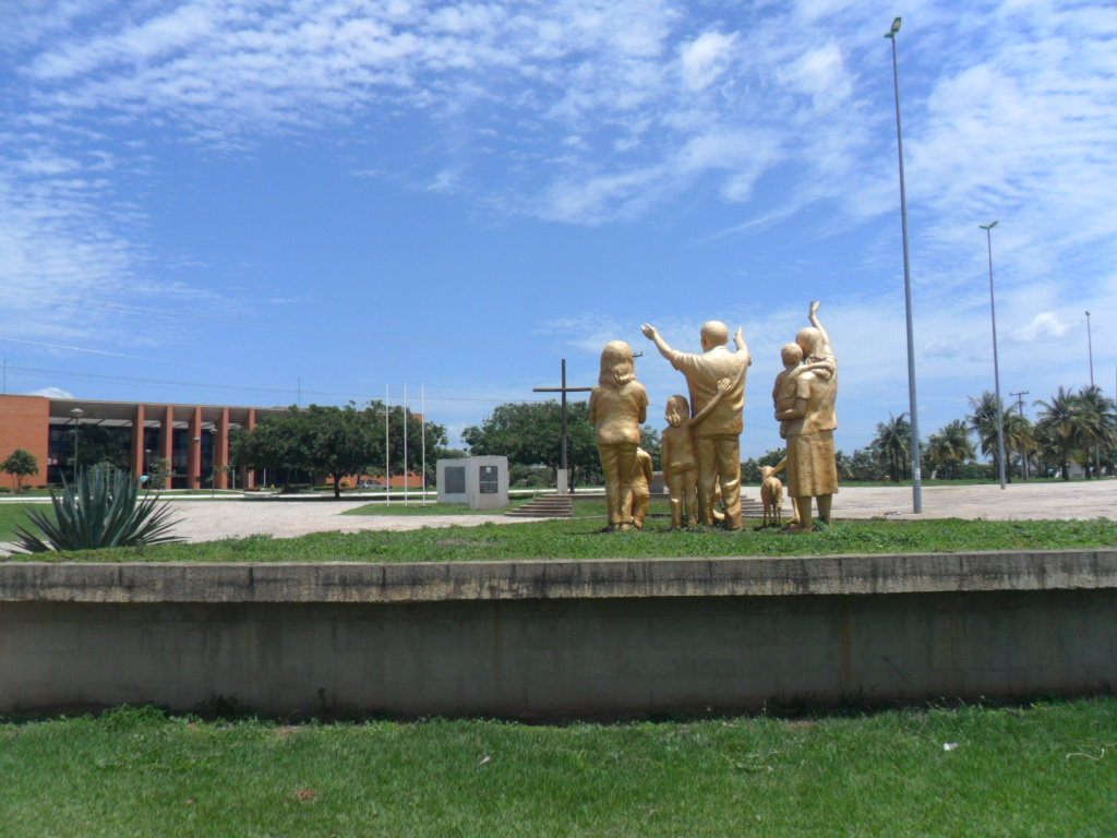 palmas to